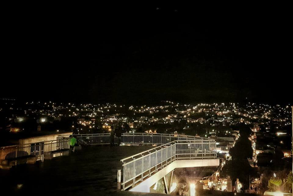 Escalinatas de los héroes, Tlaxcala, México